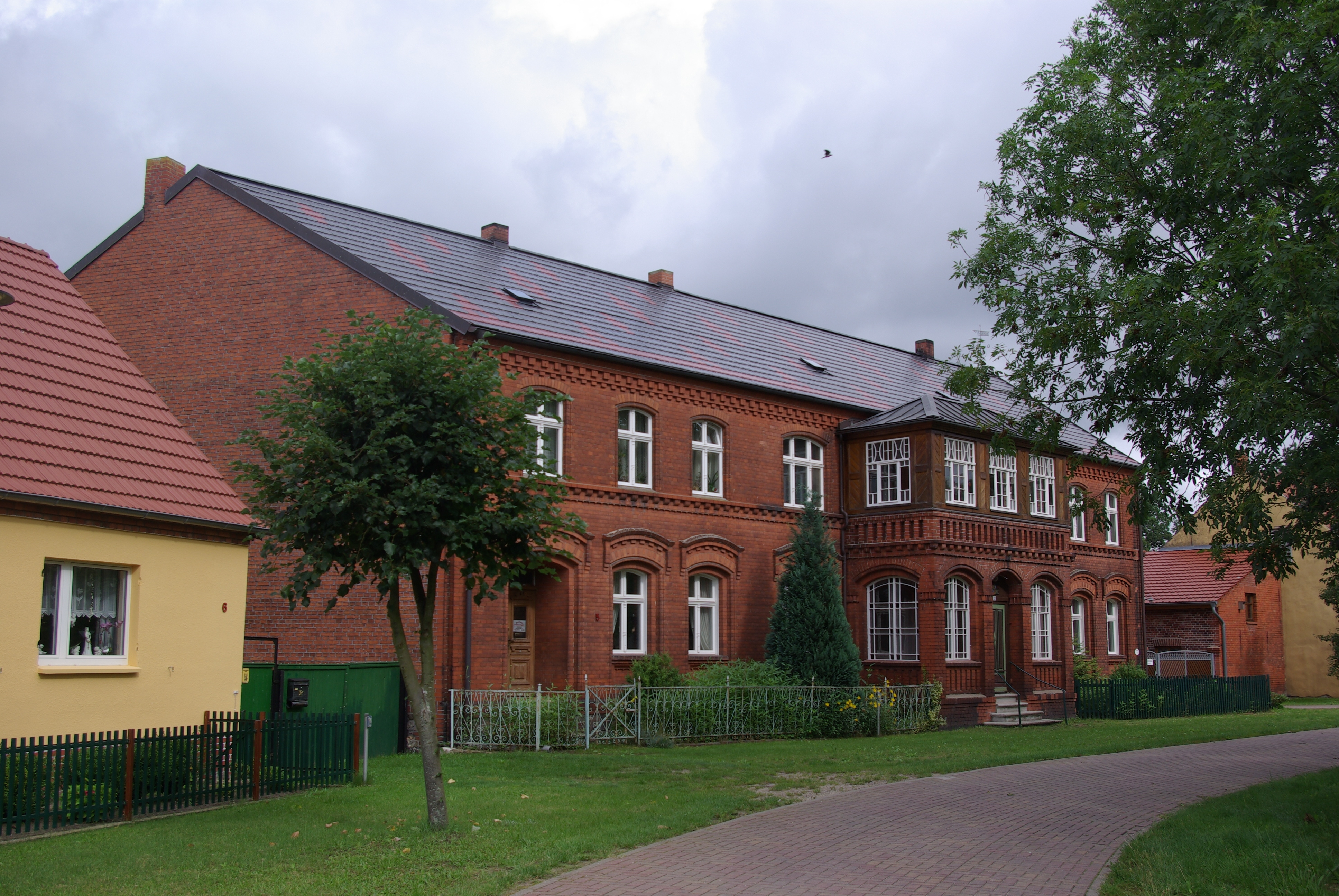 Legde/Quitzöbel in Brandenburg. Das haus Dorfstraße 5 steht gegenüber der Kirche, es ist denkmalgeschützt.